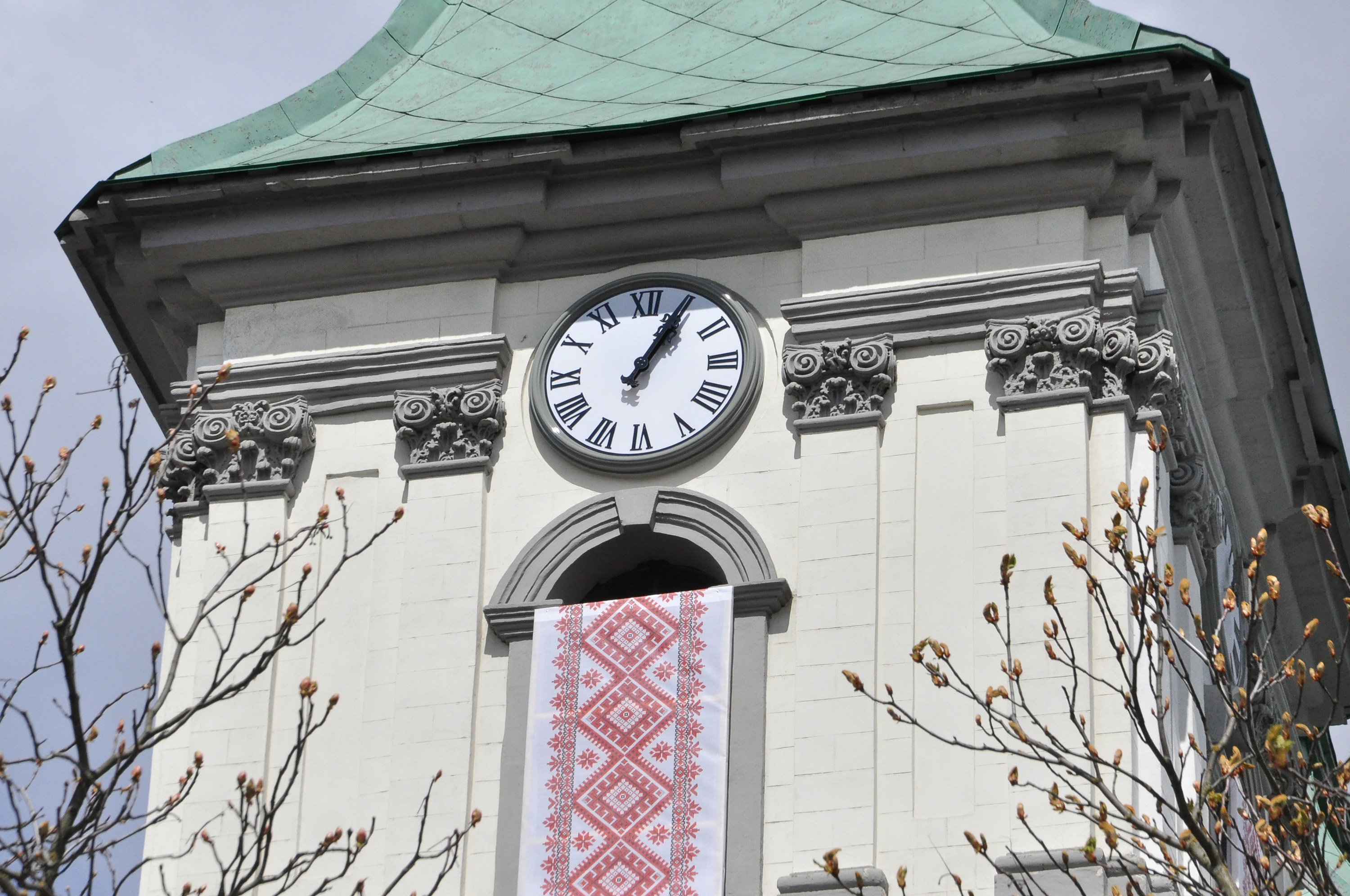 Новий годинник на дзвіниці церкви Непорочного Зачаття Пресвятої Богородиці в Тернополі.